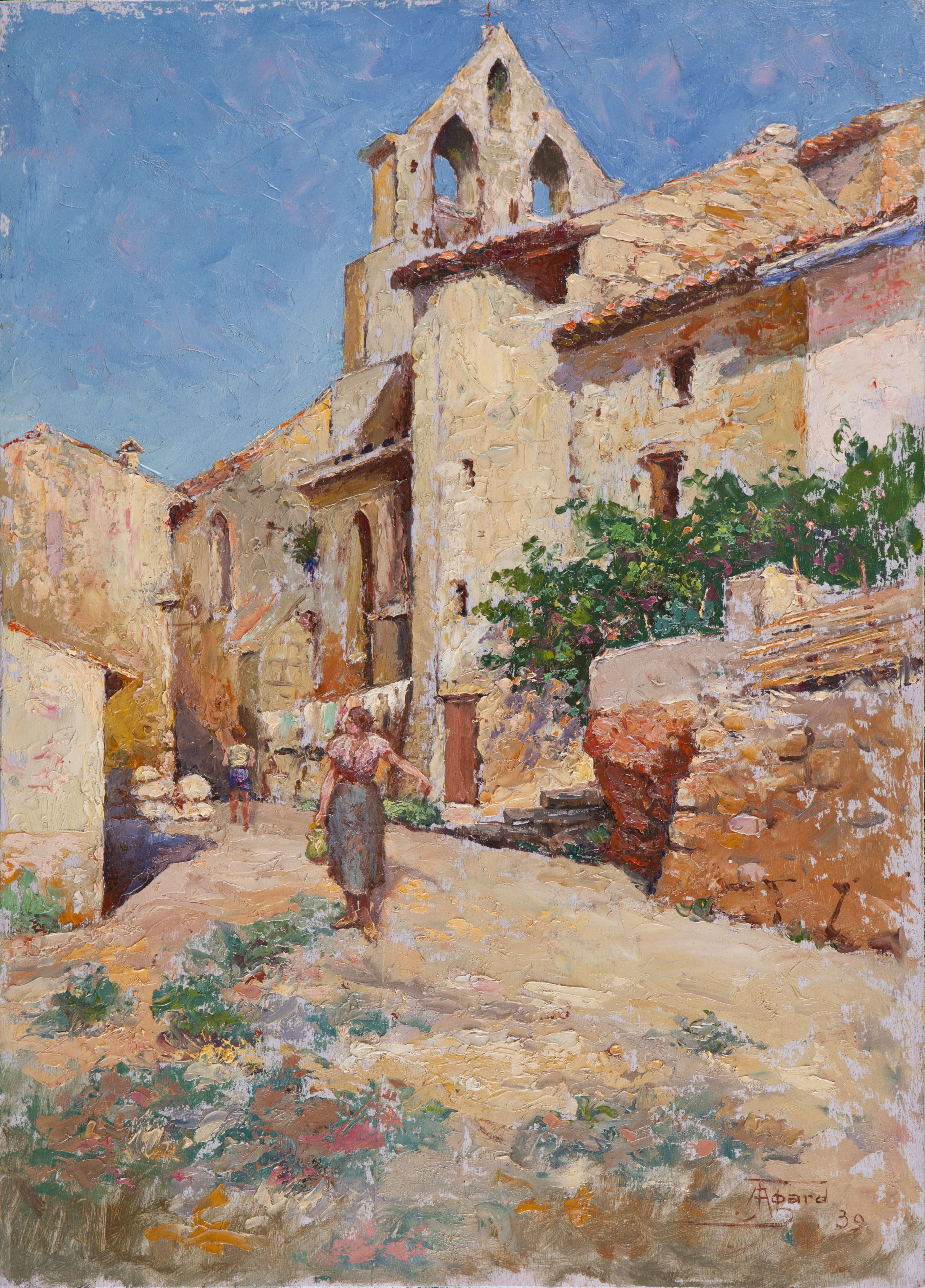 Clocher de miramas le vieux